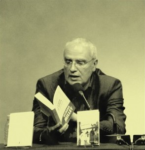 Richard Millet au Centre Georges Pompidou le 08 novembre 2010